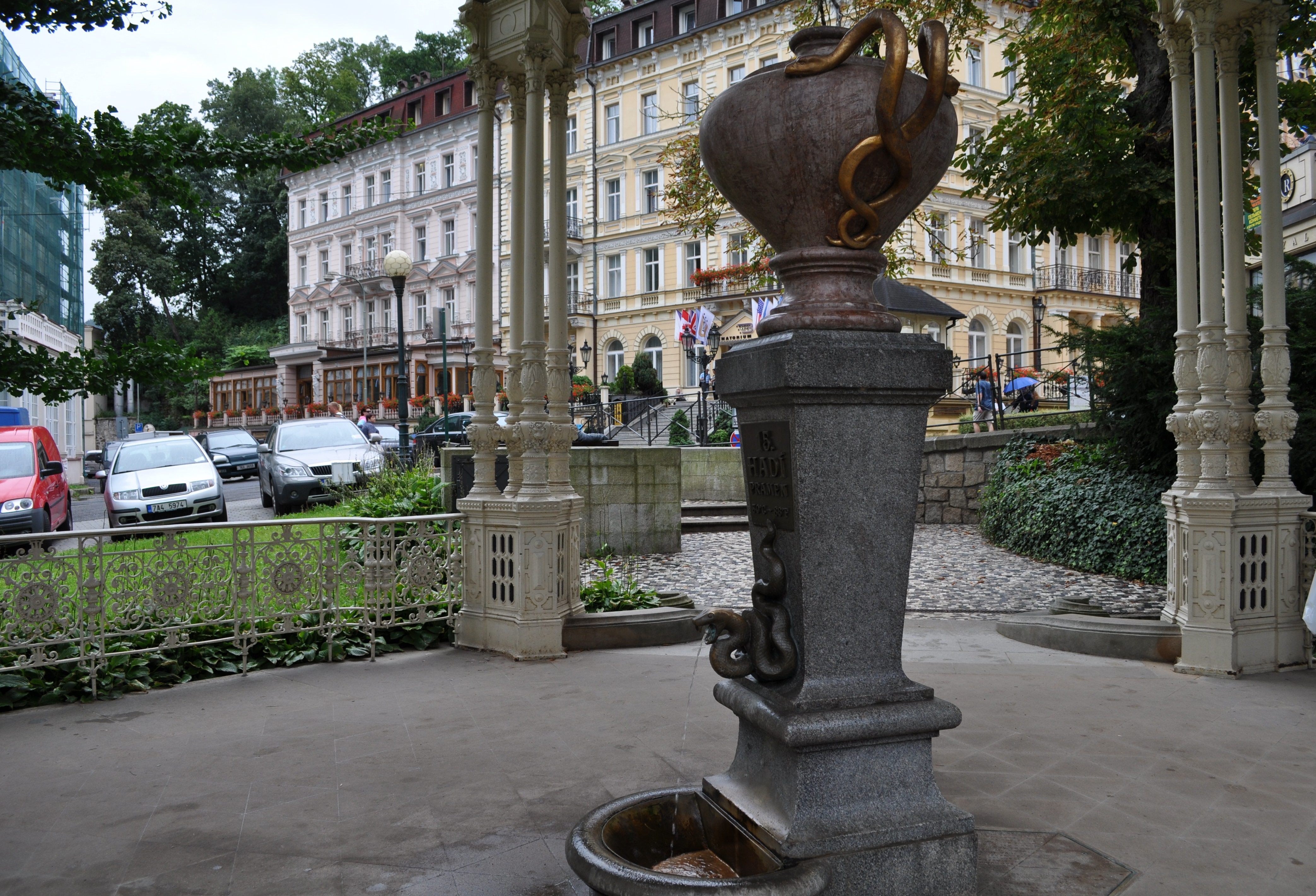 Schlangenquelle (Hadi pramen) in der Parkkolonnade in Karlsbad, Tschechien.